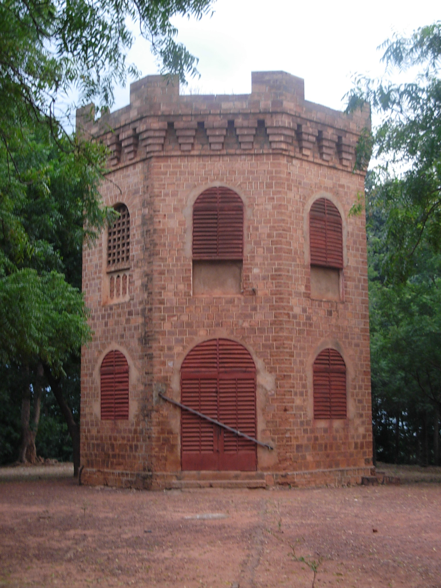 Fortification en haut du Mamelon de Sikasso (Mali)